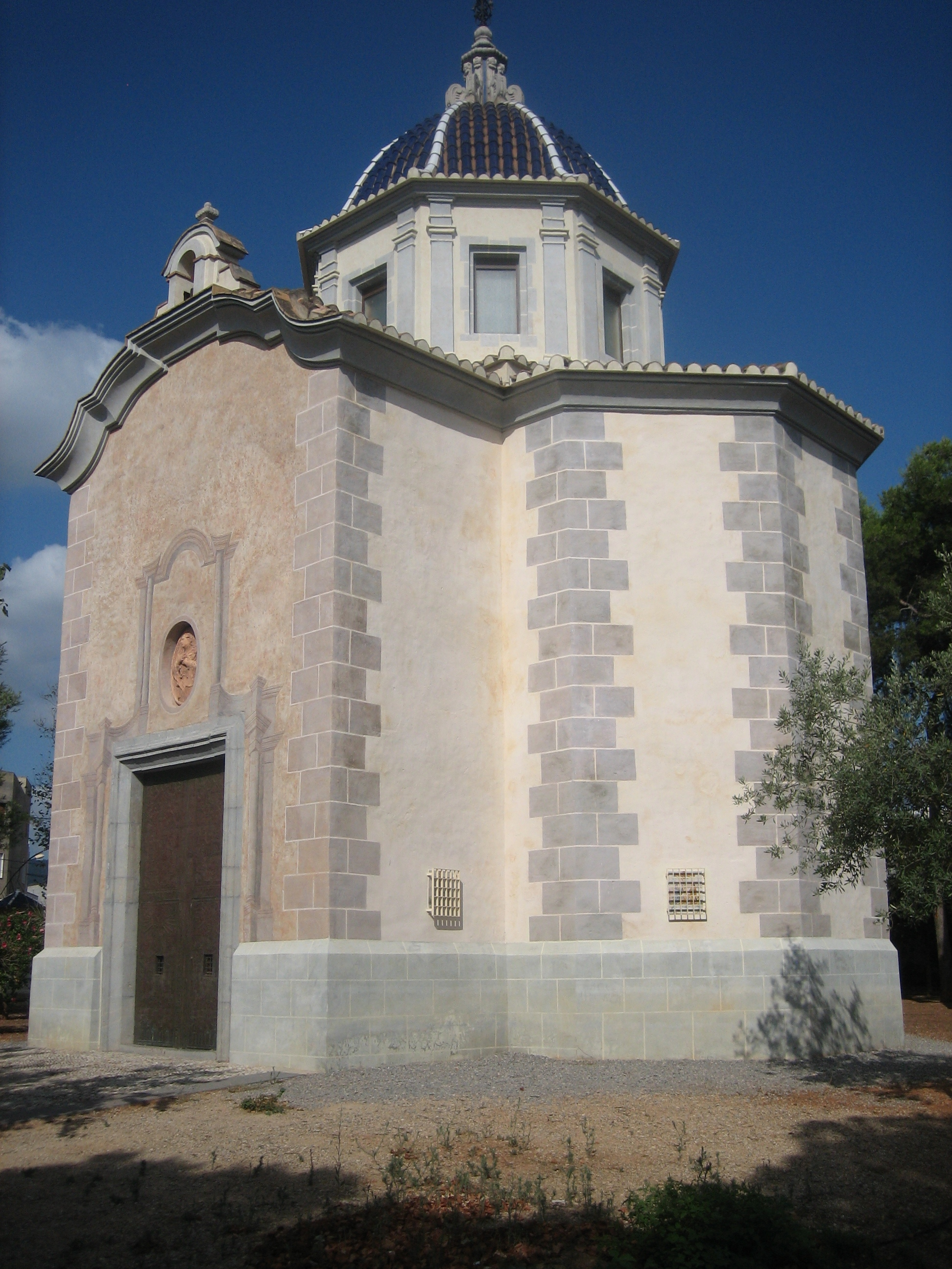 Ermita del Calvari de Betxí (Plana Baixa)